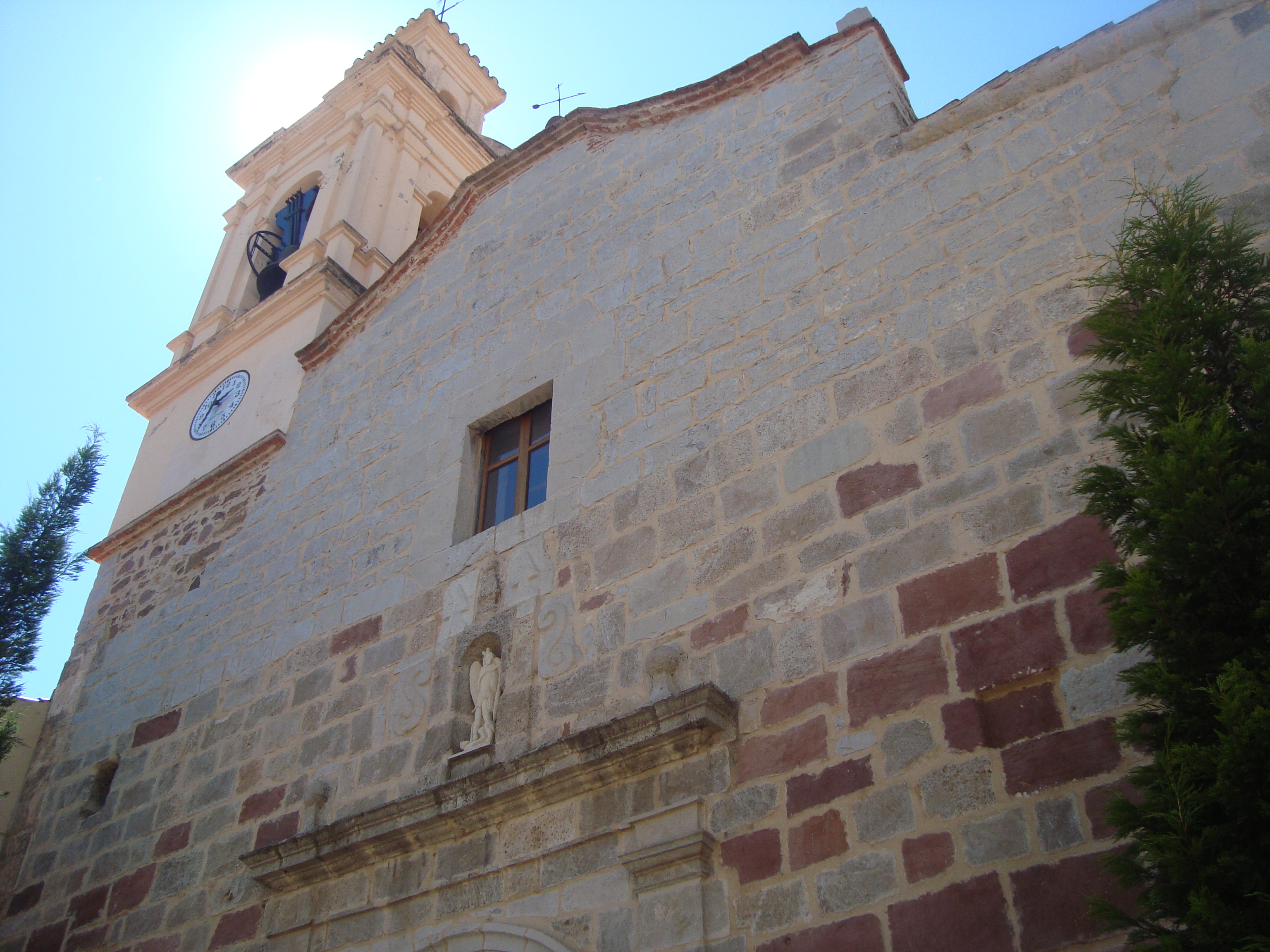 Església parroquial de Sant Miquel Arcàngel (la Pobla Tornesa) 05.094-001.